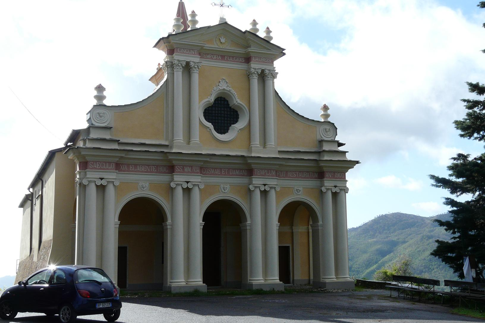 Santuario dei S.S. Cosma e Damiano, Stellanello, Liguria, Italia